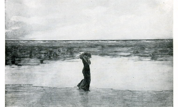 Клингер Покинута: офорт